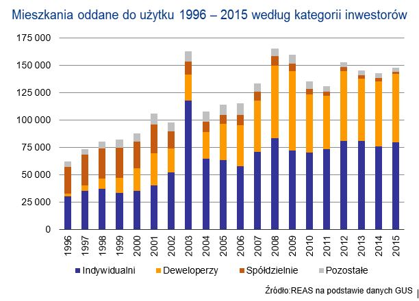 Wykres przedstawiający liczbę mieszkań oddanych do użytku w latach 1996-2015 wg kategorii inwestorów - przygotowanie REAS na podstawie danych GUS